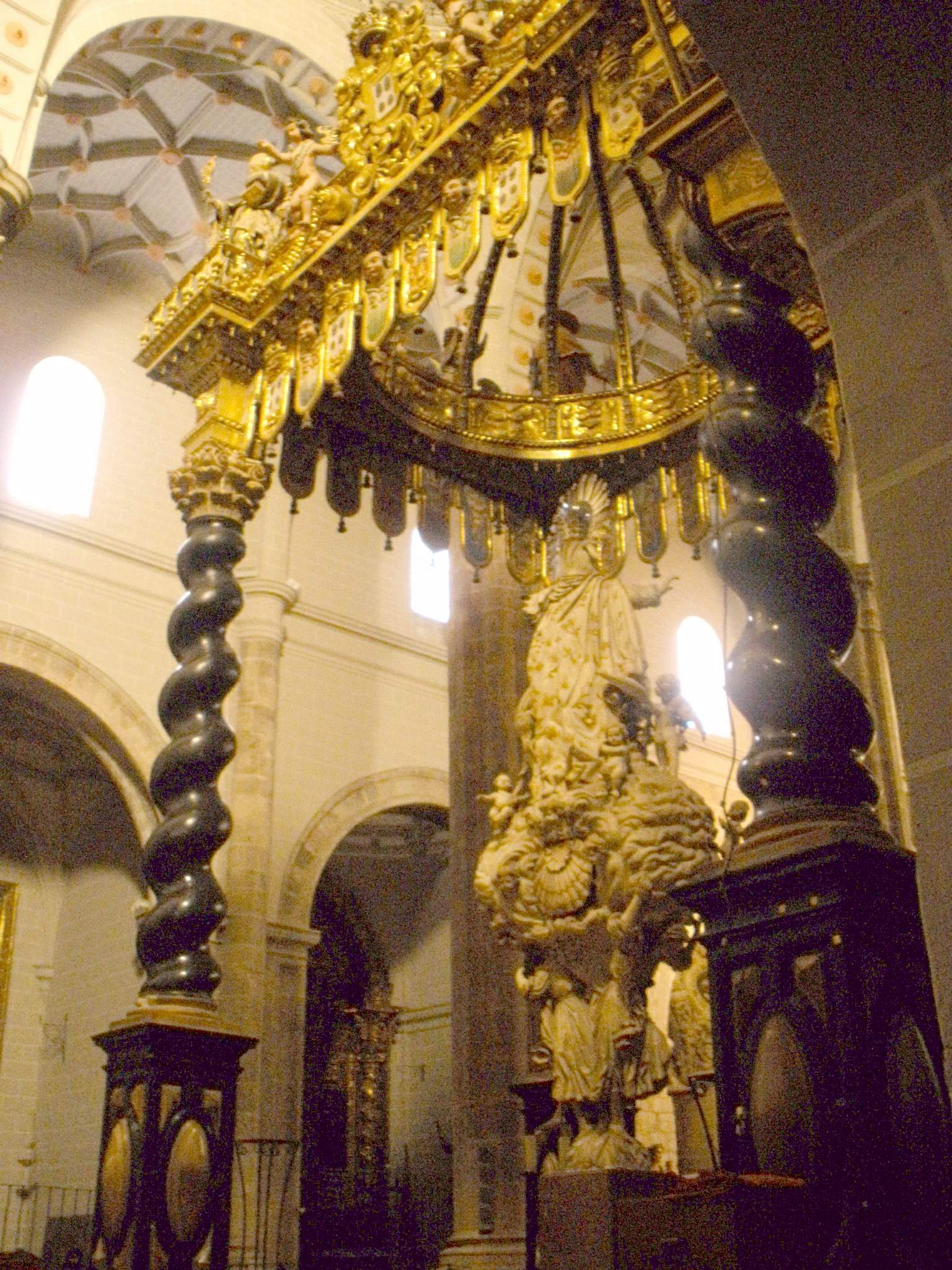 Colegiata de Santa Maria de los Sagrados Corporales (Daroca, Zaragoza)